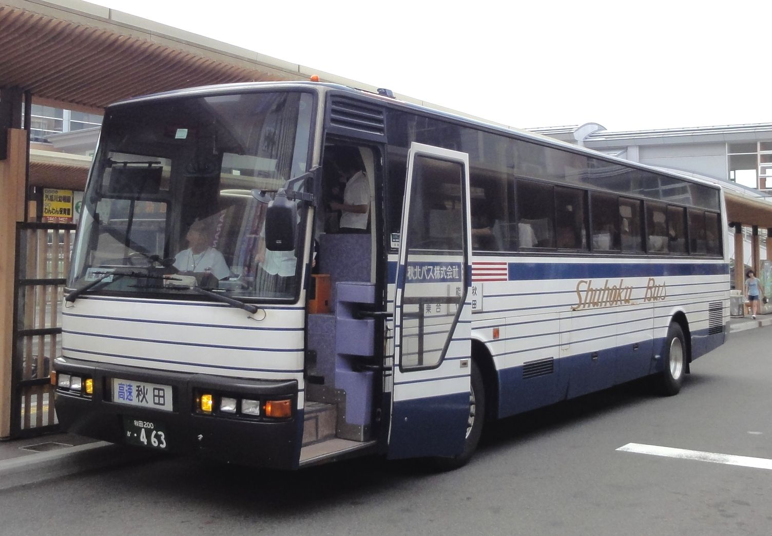 秋北バス 能代 - 秋田線